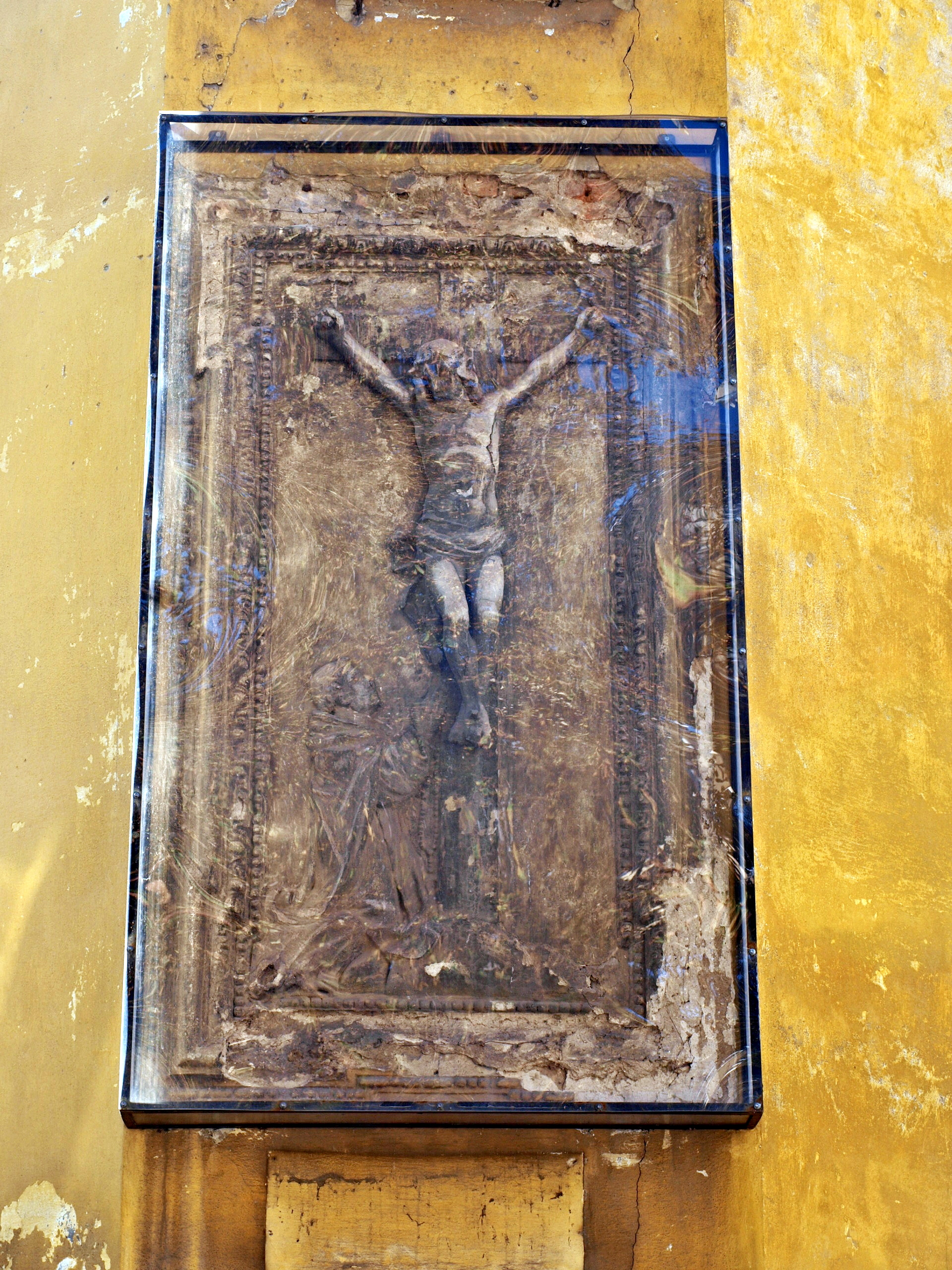 Braník, dominikánský dvůr - plastika